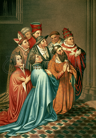 Ferran d'Antequera, Elionor d'Alburquerque i Benet XIII, dibuix de Jaume Serra per a la Iconografía española de Valentín Carderera, 1855-1864 (colección Carderera, Biblioteca Nacional, Madrid), a partir d'un retaule del s. XV avui desaparegut